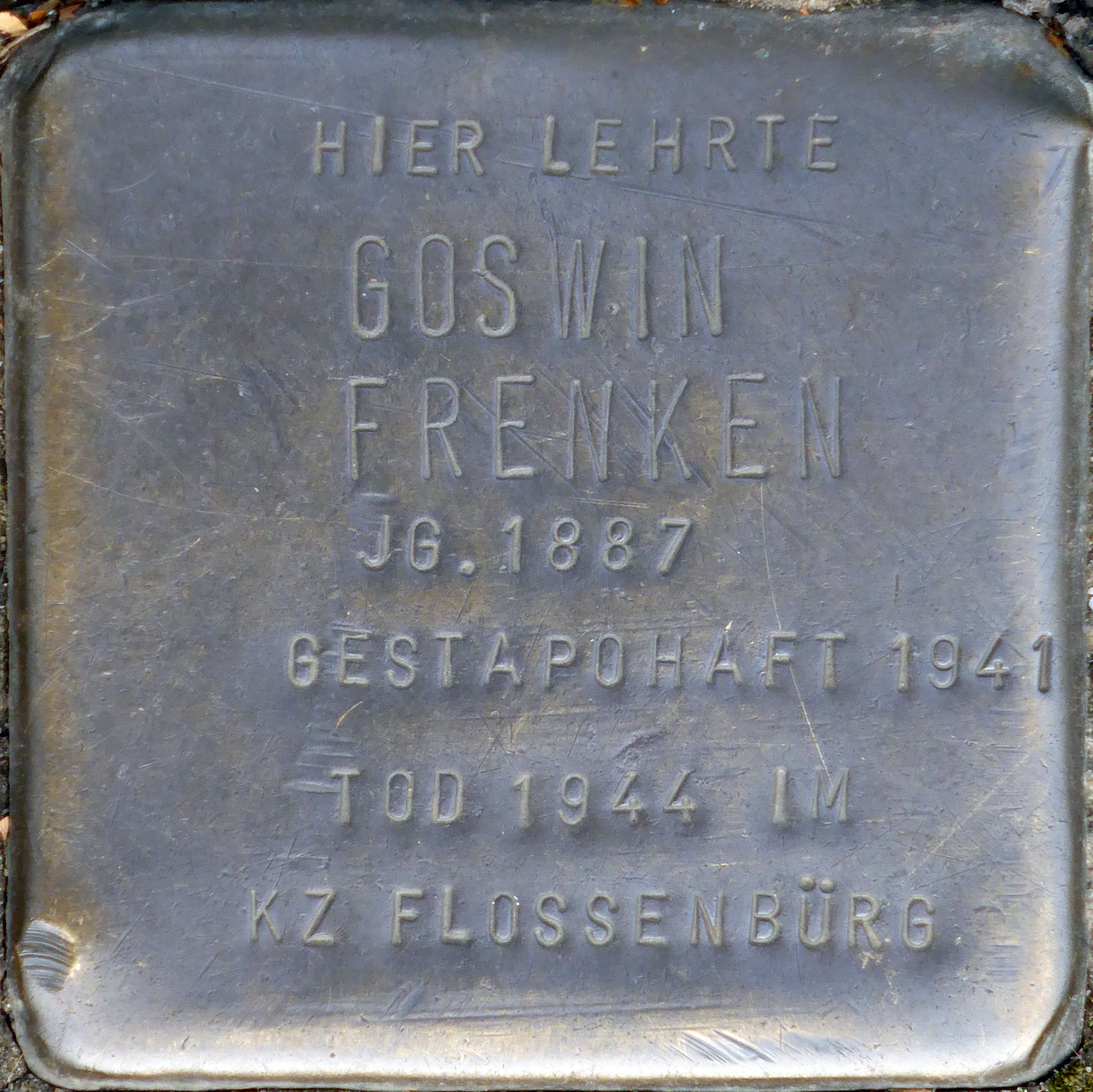 Stolperstein: Goswin Frenken, Uni-Vorplatz, Köln